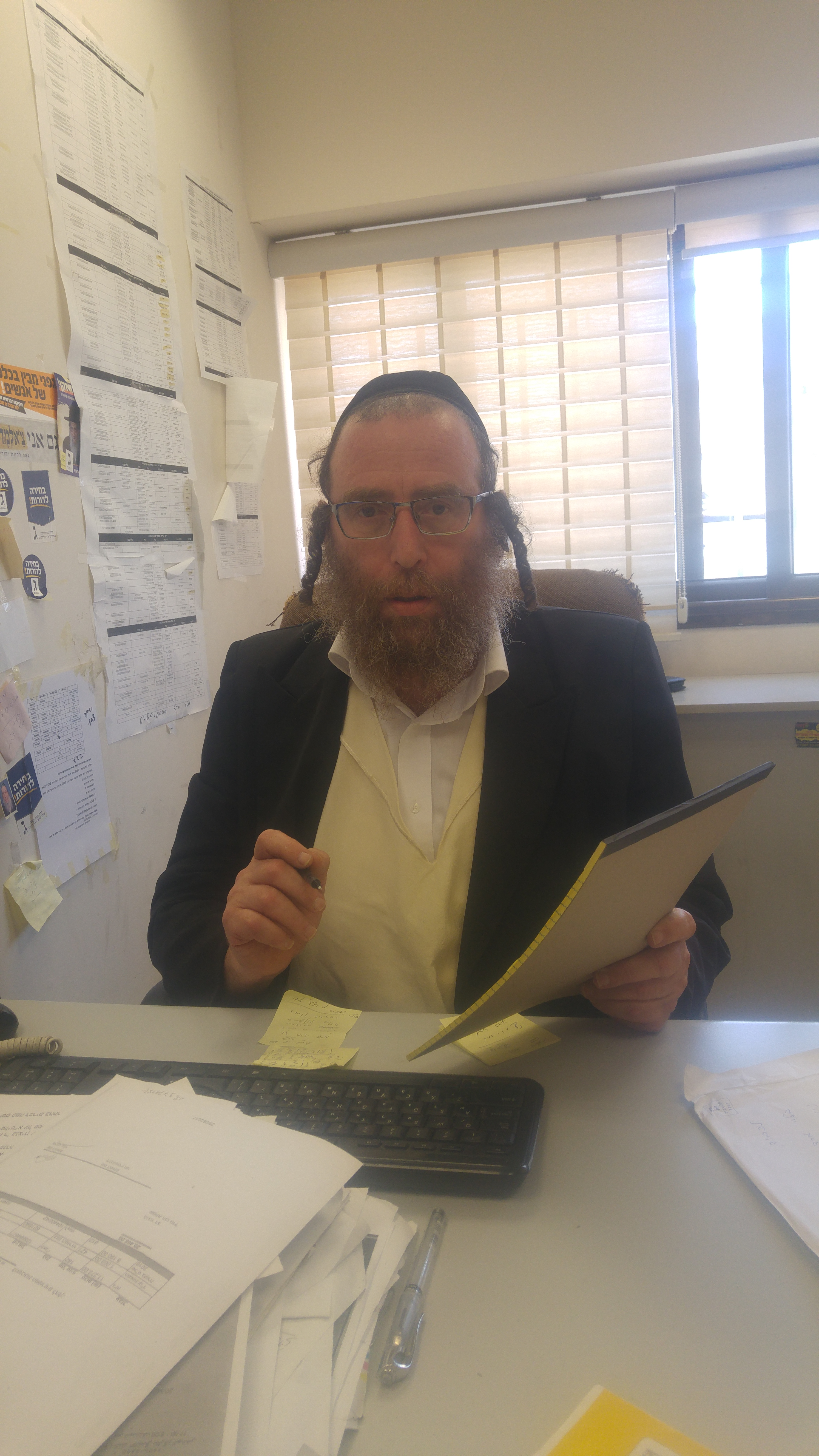 הרב מרדכי בלוי במשרדו